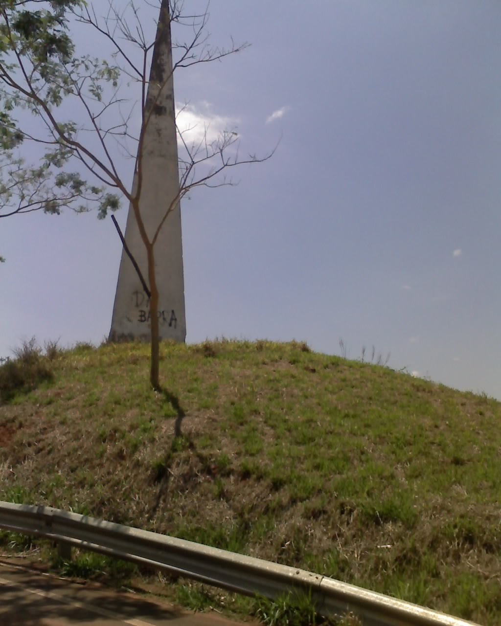 Obelisco - Centro Geométrico ou Geográfico do Estado de São Paulo.